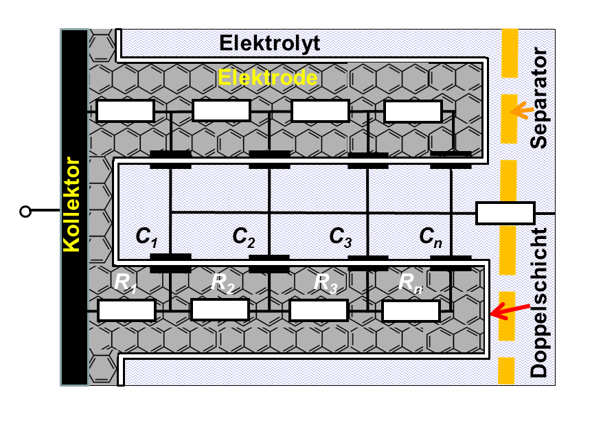 RC-Modell in einer Pore in einer Elektrode eines Doppelschichtkondensators